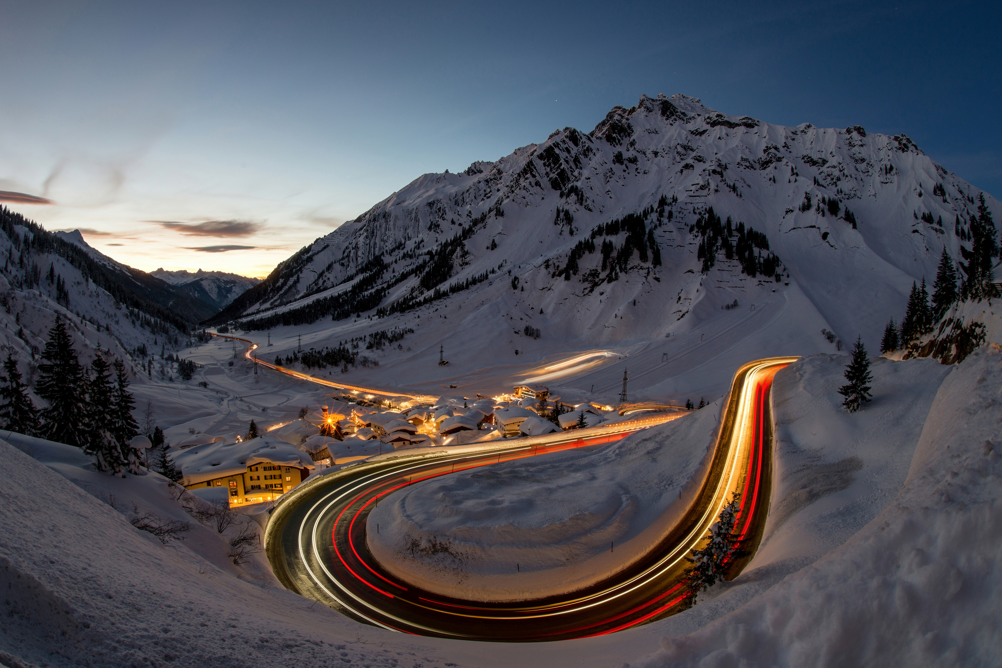 Stuben zur "Blauen Stunde", gesehen von der Arlbergstraße.